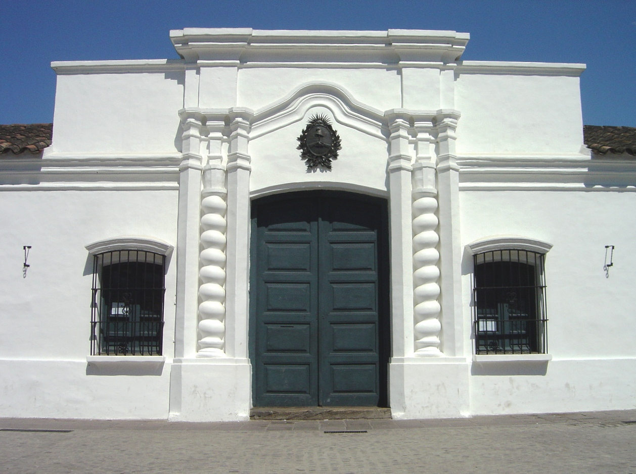 Independence House, Tucumán, Argentina.